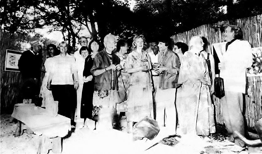 Anniversaire des 27 ans de la Fondation, Olivia Paschkoff, Zenka Bartek, l'associée et compagne de la Comtesse Judith Karolyi, ainsi que Flore.